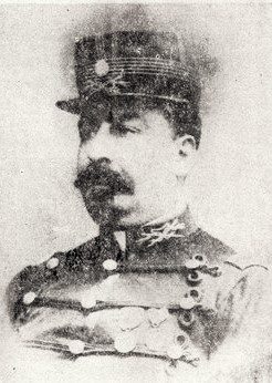 Teniente coronel Florencio Monteagudo (1852-1909) militar argentino.